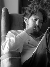 Mauricio Pilatowsky Braverman (14 Abril de 1958, Ciudad de México) es un filósofo e historiador; investigador y profesor de la Universidad Nacional Autónoma de México, que se ha especializado en el análisis critico de las identidades nacionales.